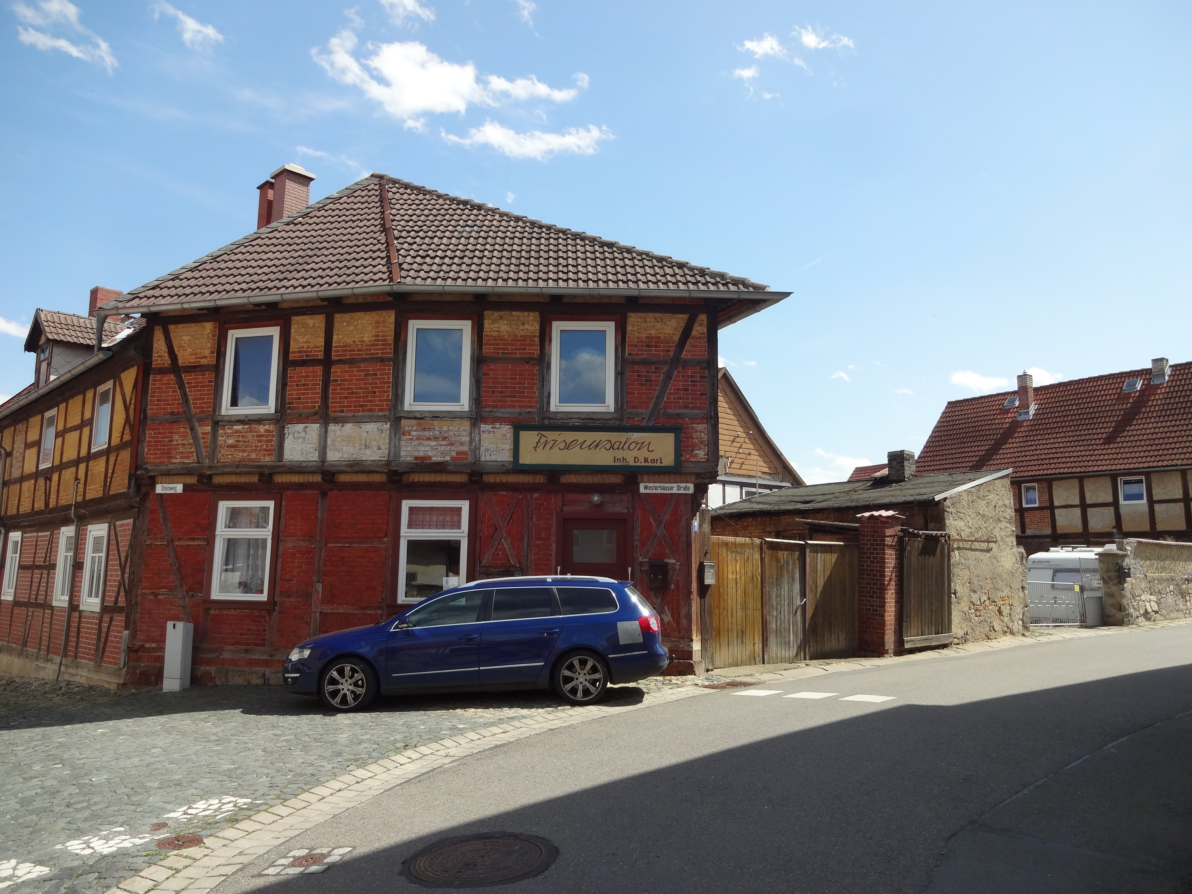 denkmalgeschütztes Wohnhaus in der Westerhäuser Straße 1 in Börnecke, Ortsteil von Blankenburg/Harz